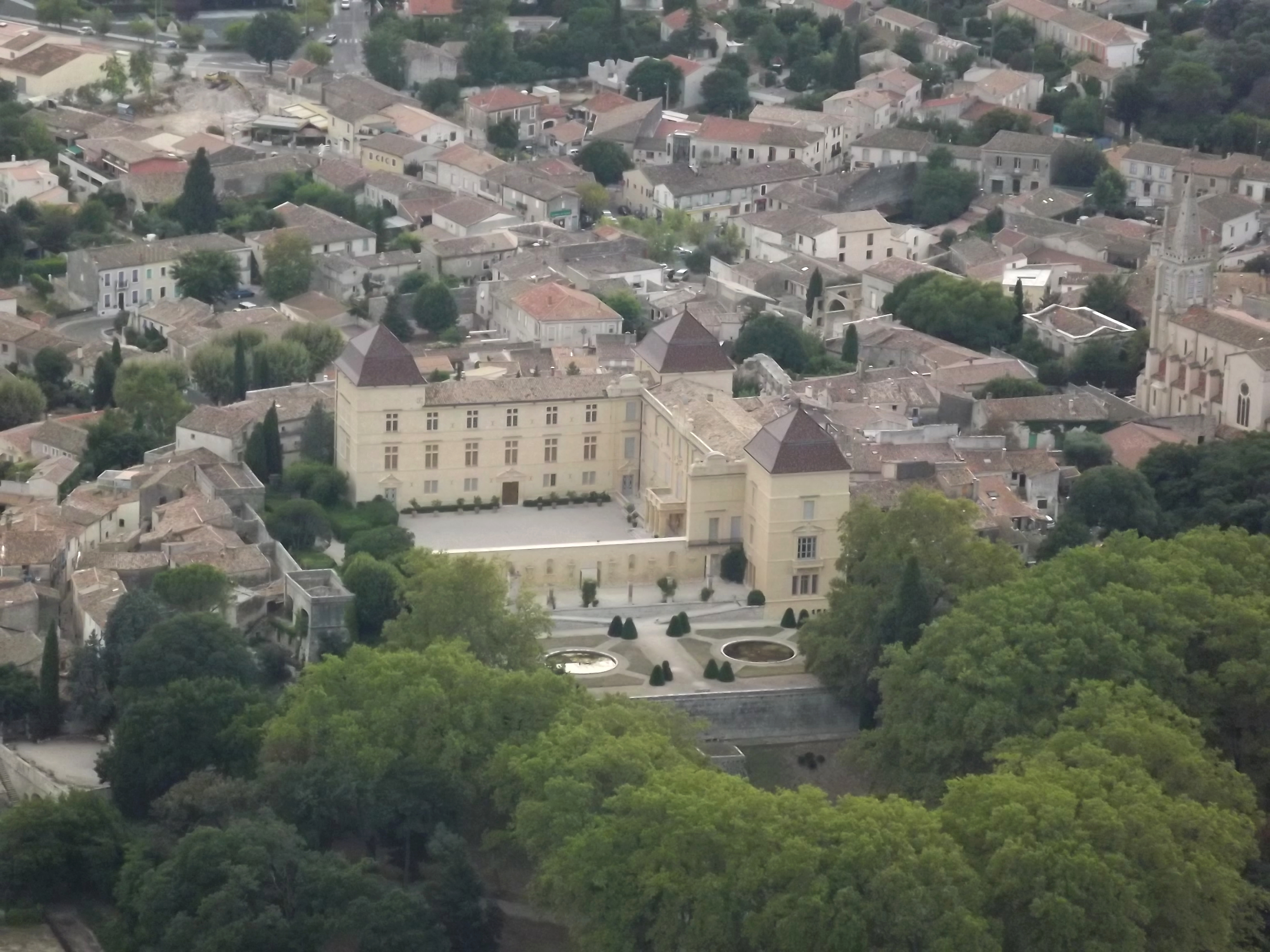 Chateau de Castrie